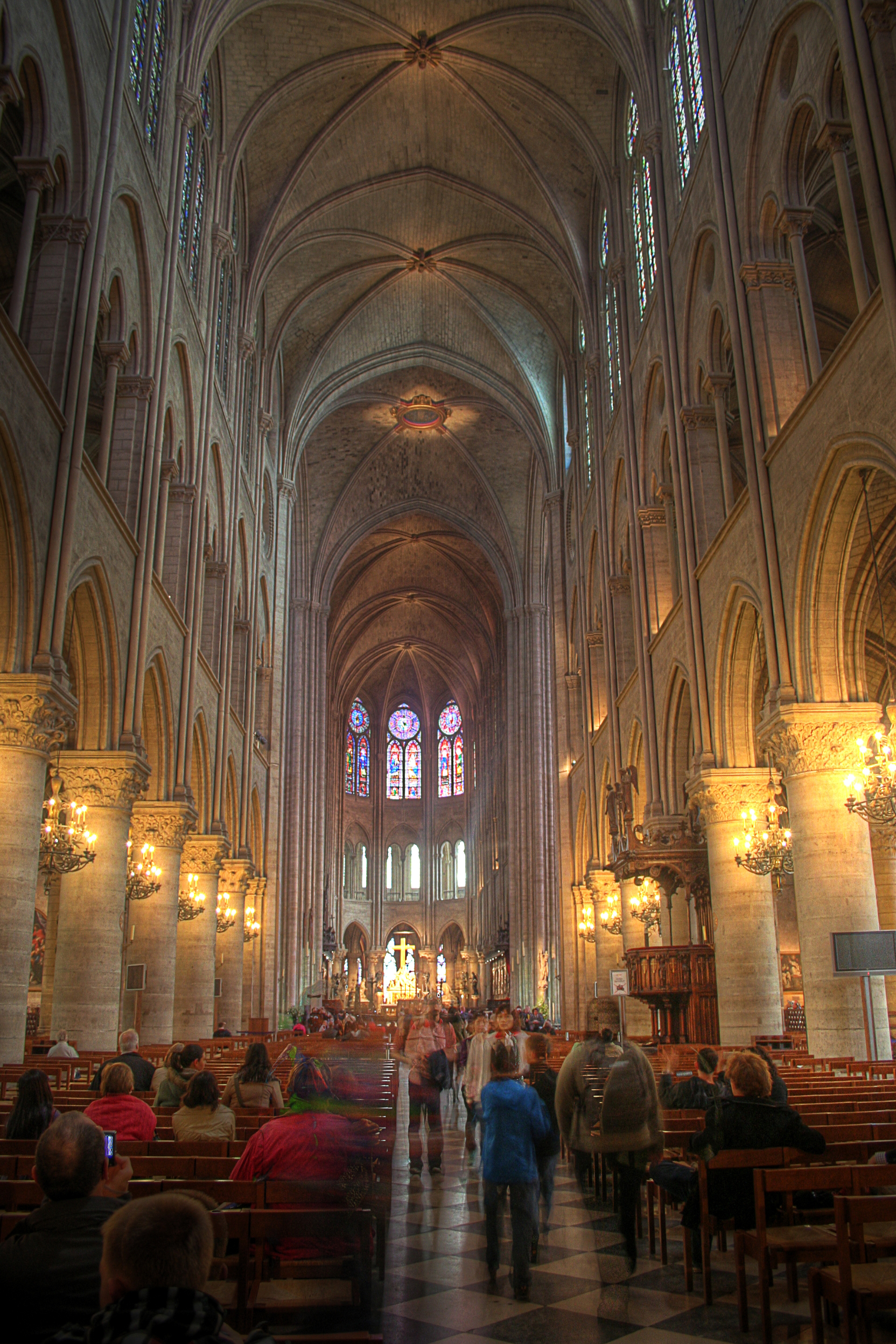 Nef de la Cathédrale Notre-Dame de Paris, IVe arrondissement, Paris, France.